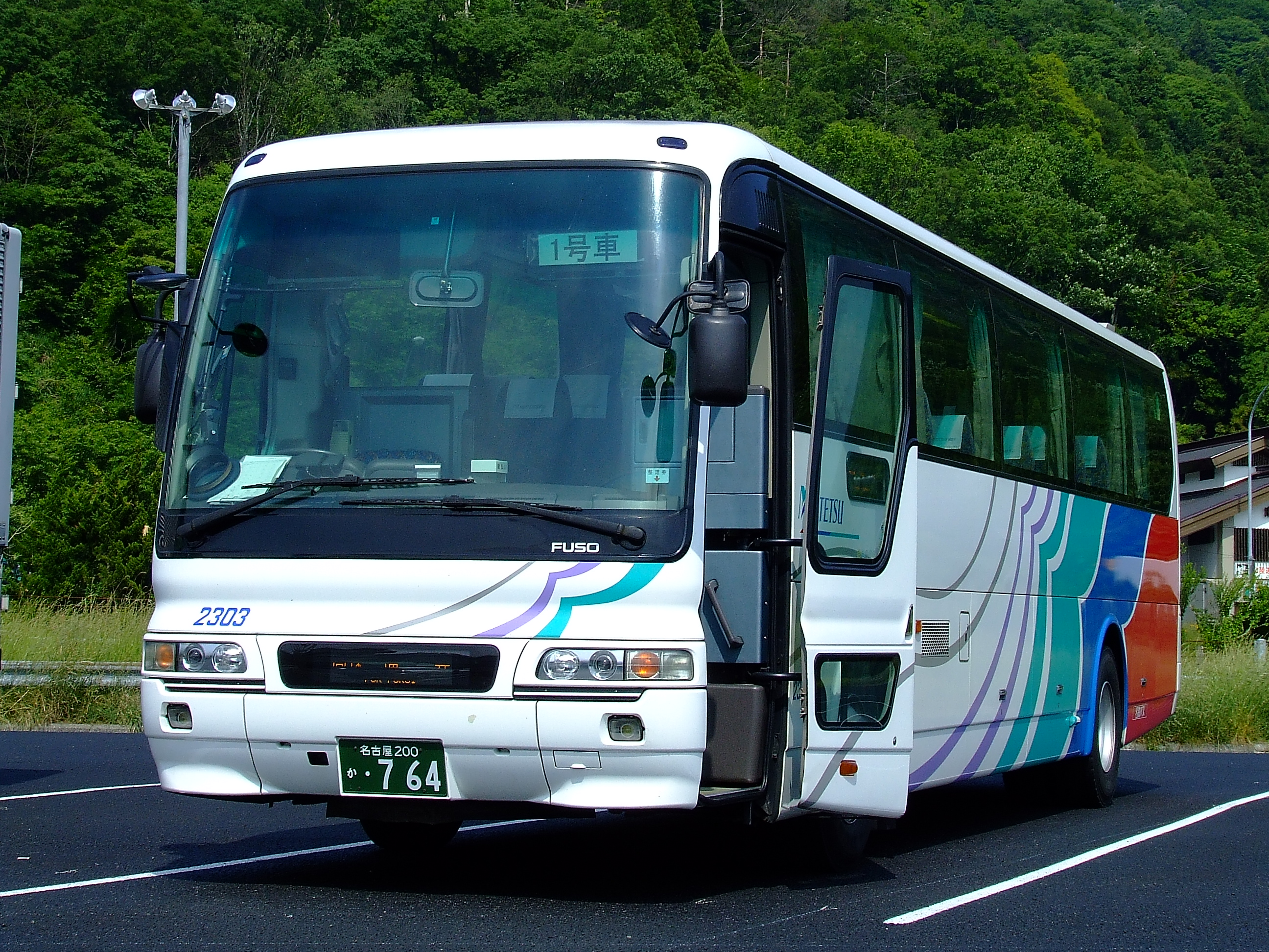 名鉄バスの高速バス「北陸道特急バス（福井線）」 賤ヶ岳サービスエリアにて